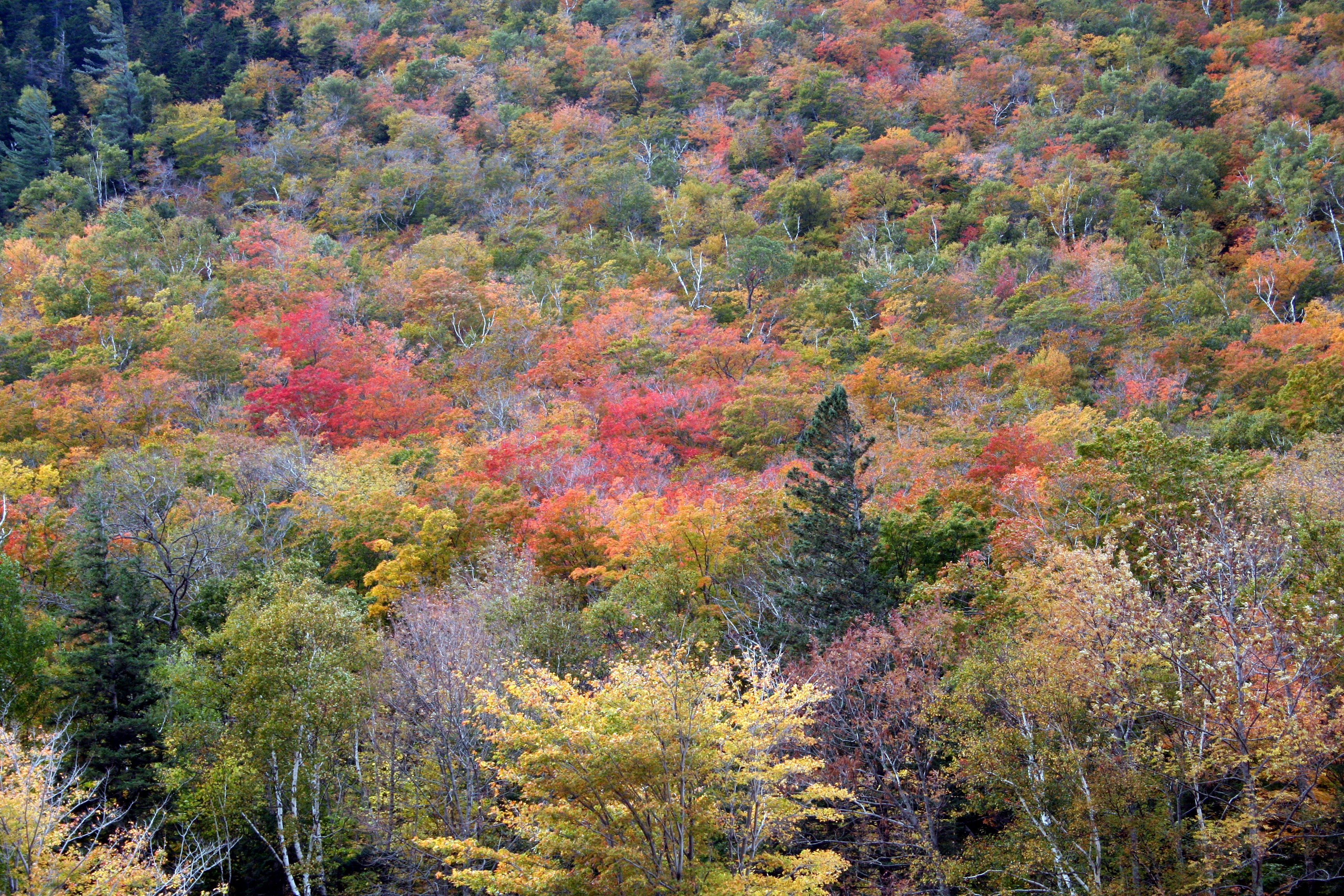 ന്യൂ ഹാംഷെയറിലെ വൈറ്റ് മൗണ്‍ടന്‍ നാഷനല്‍ പാര്‍ക്ക് - ഒരു ശരത്കാല ദൃശ്യം